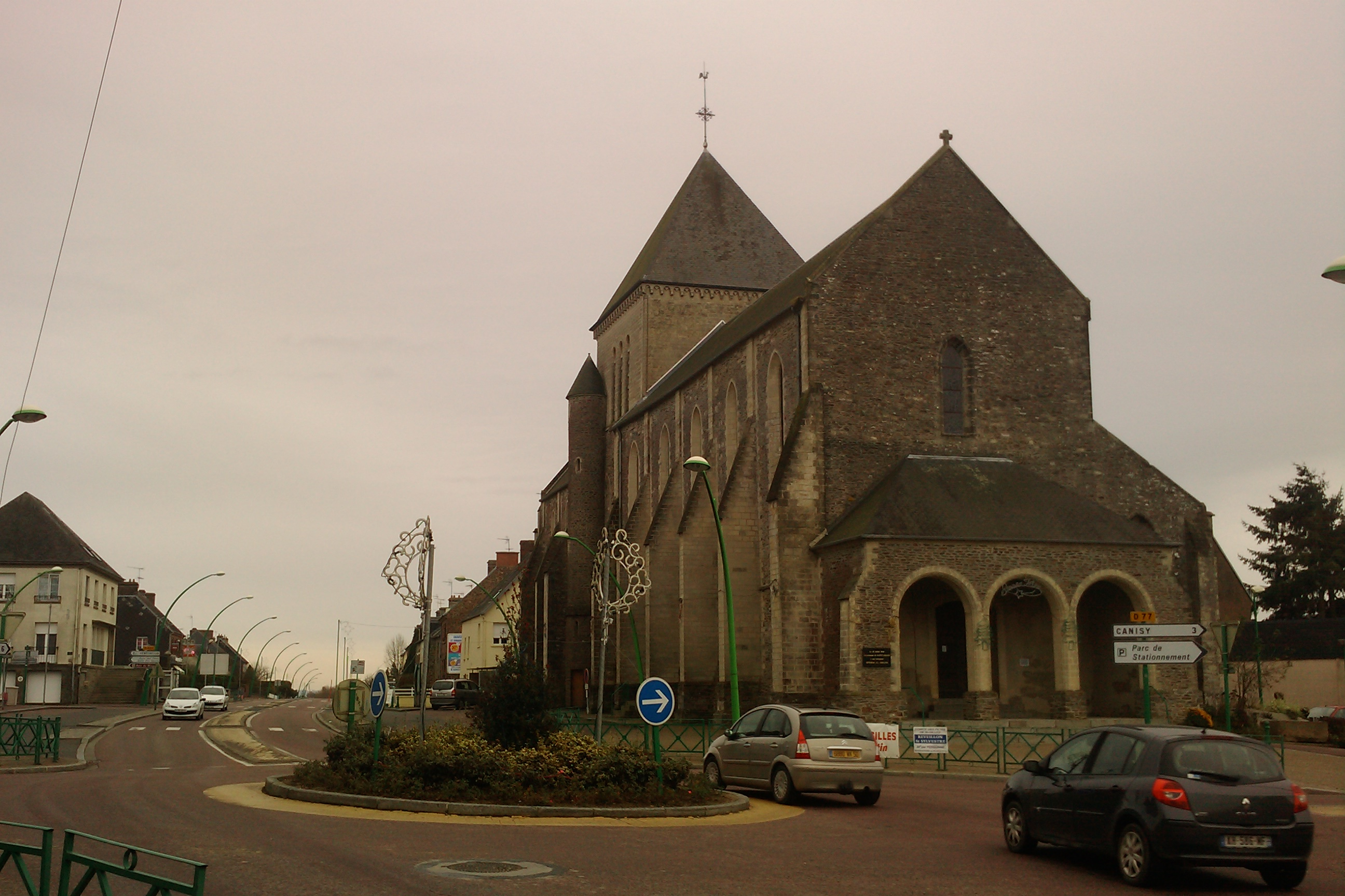 église Saint-Gilles de Saint-Gilles